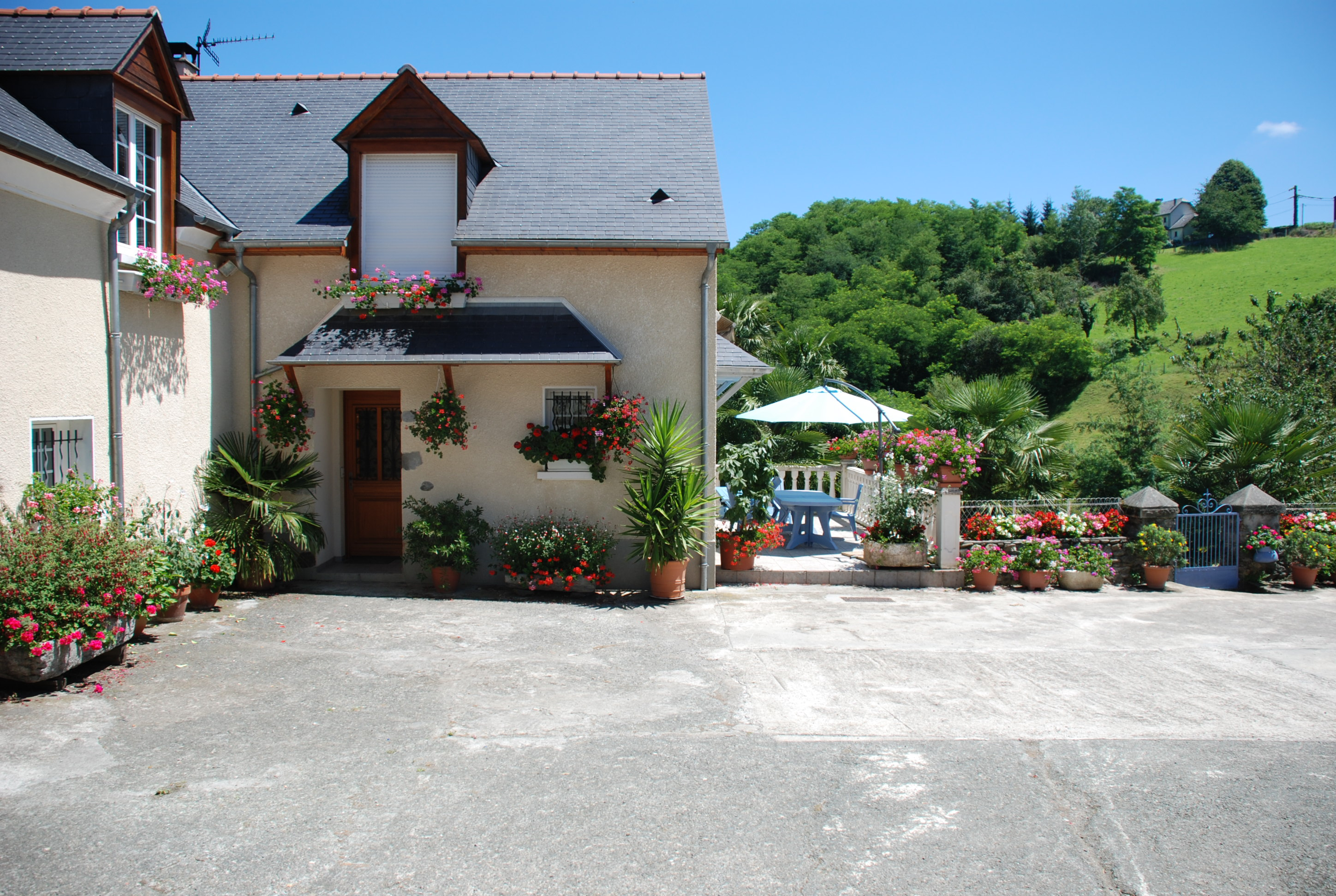 Entrée de la cour de la maison Arcos vue depuis la rue principale, ancienne grange à droite avec extension transformée en habitation.Fleurissement en harmonie avec celui de la traversée du village.